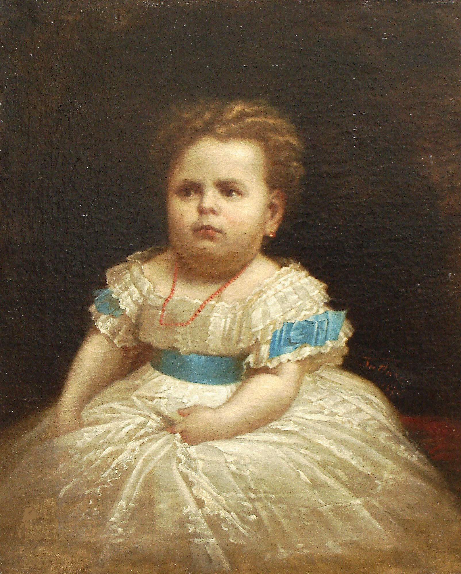 Gheorghe Tattarescu - Marioara, fiica pictorului - Portretul fiicei pictorului (5-6 ani) văzută din faţă, uşor în semiprofil stânga.